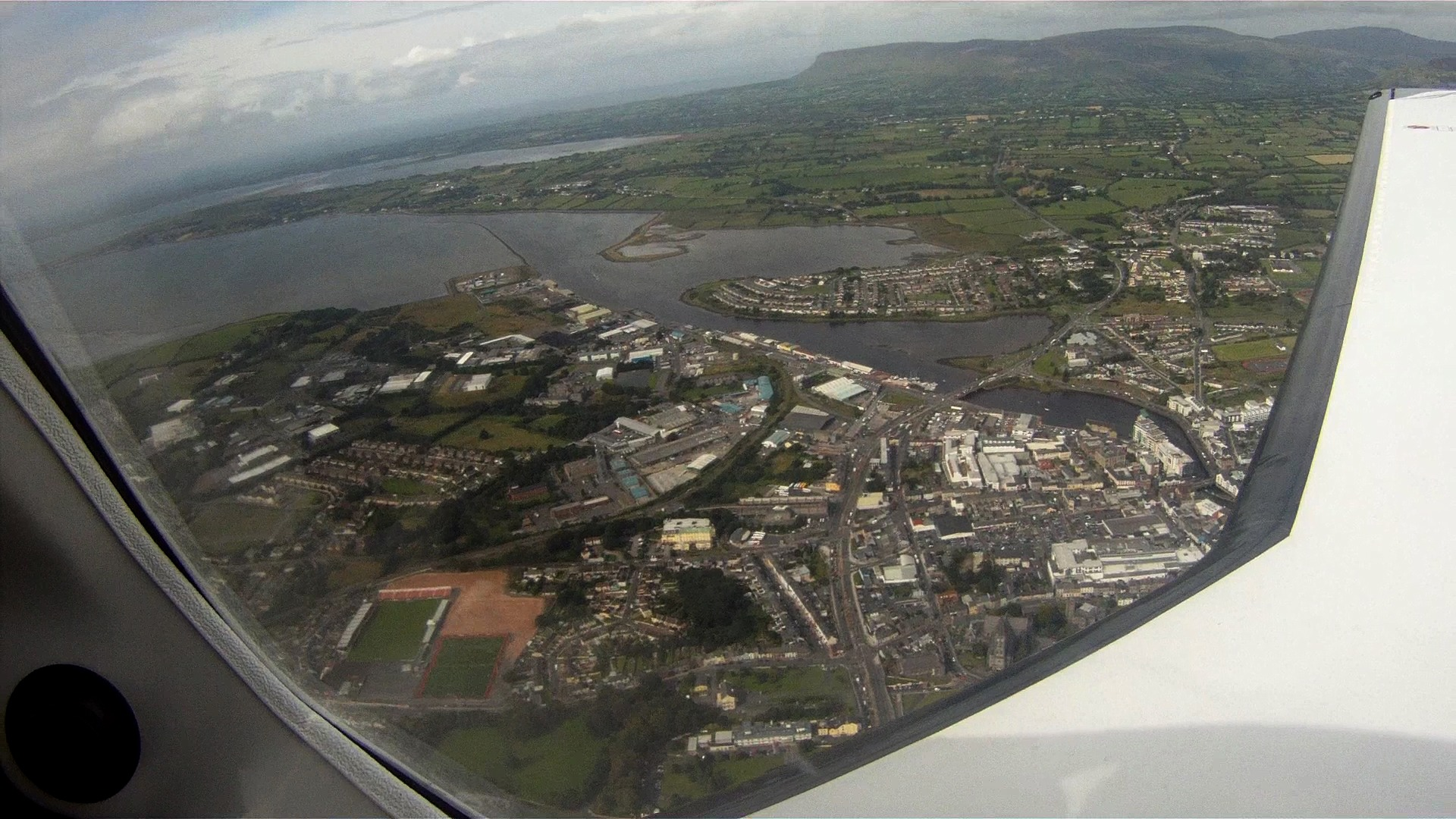 Luftbild von Slogo